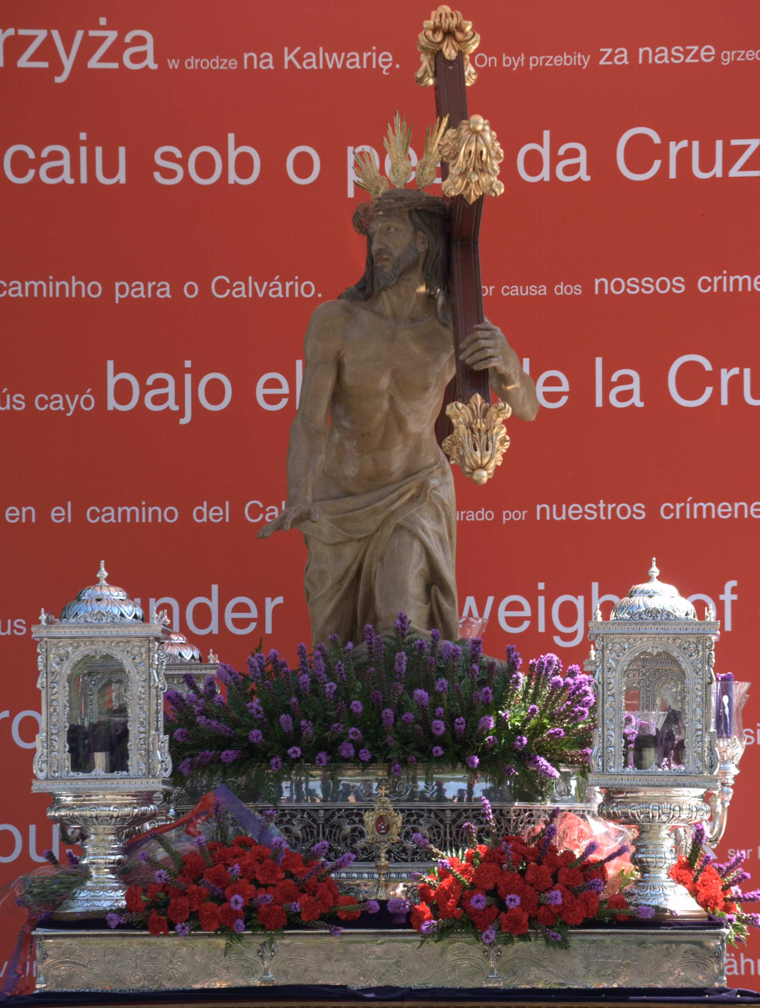 Obra de Mariano Benlliure, constituyó la Sexta Estación de Penitencia en el Vía Crucis de la Jornada Mundial de la Juventud 2011 de Madrid presidido por su Santidad Benedicto XVI